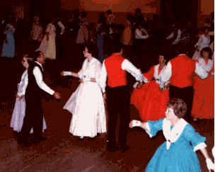 Volkspele